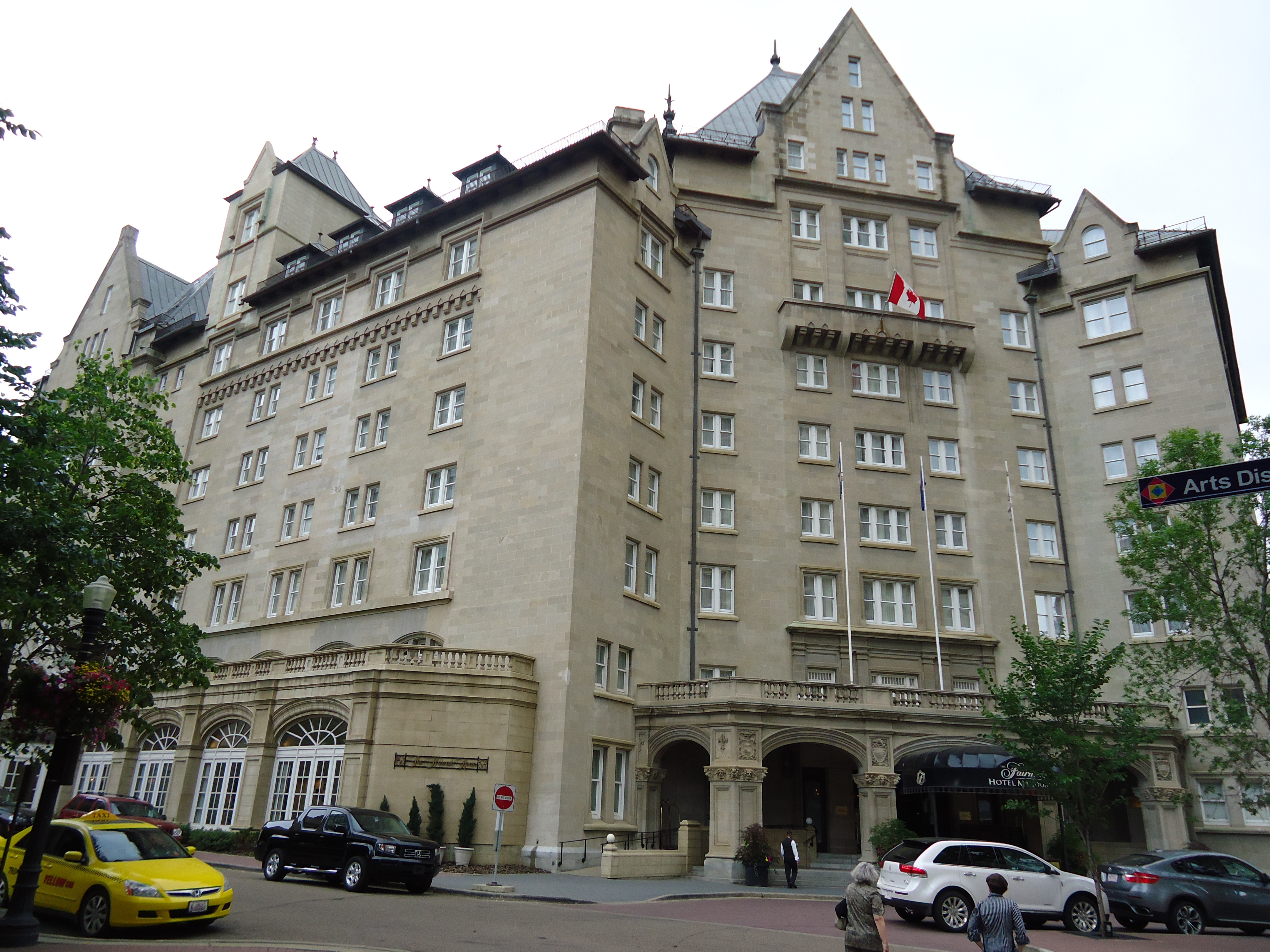 Construit de 1912 à 1915